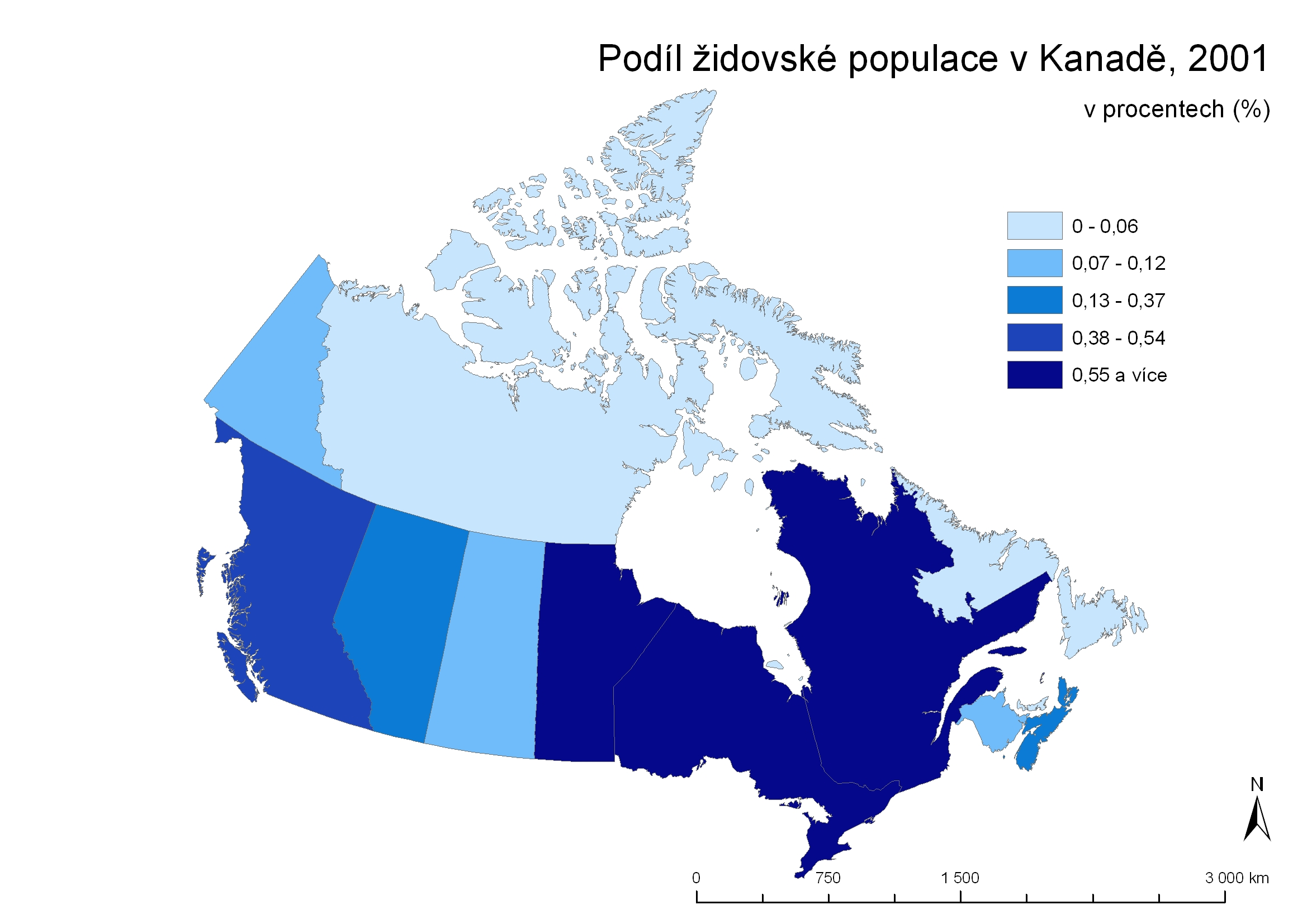 Podíl židovské populace v Kanadě, 2001 (teritorium Nunavut součástí Severozápadního teritoria)